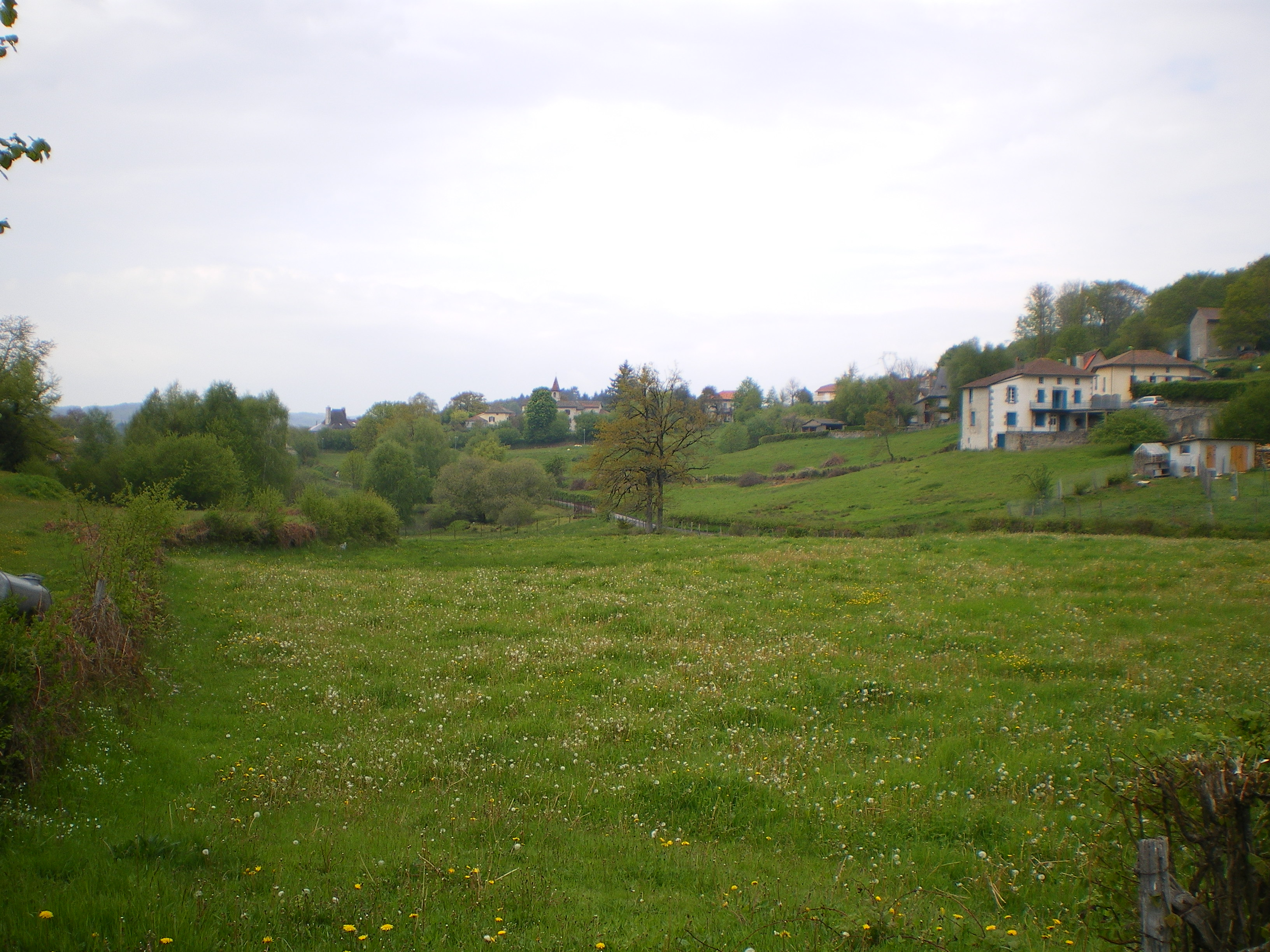 La Ségalassière, Cantal, France